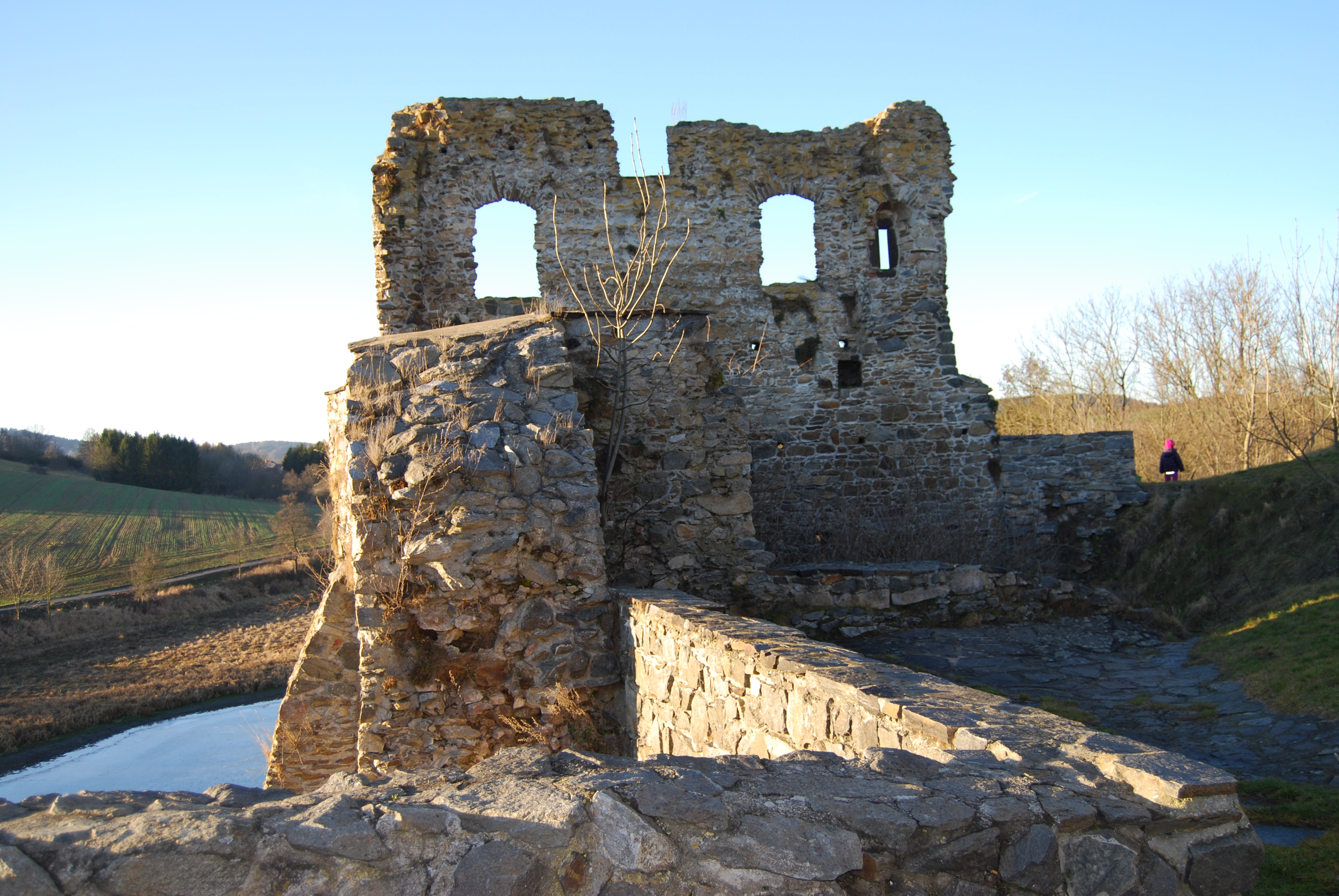 Hrad Borotín, zřícenina - (okres Tábor). Česká republika.